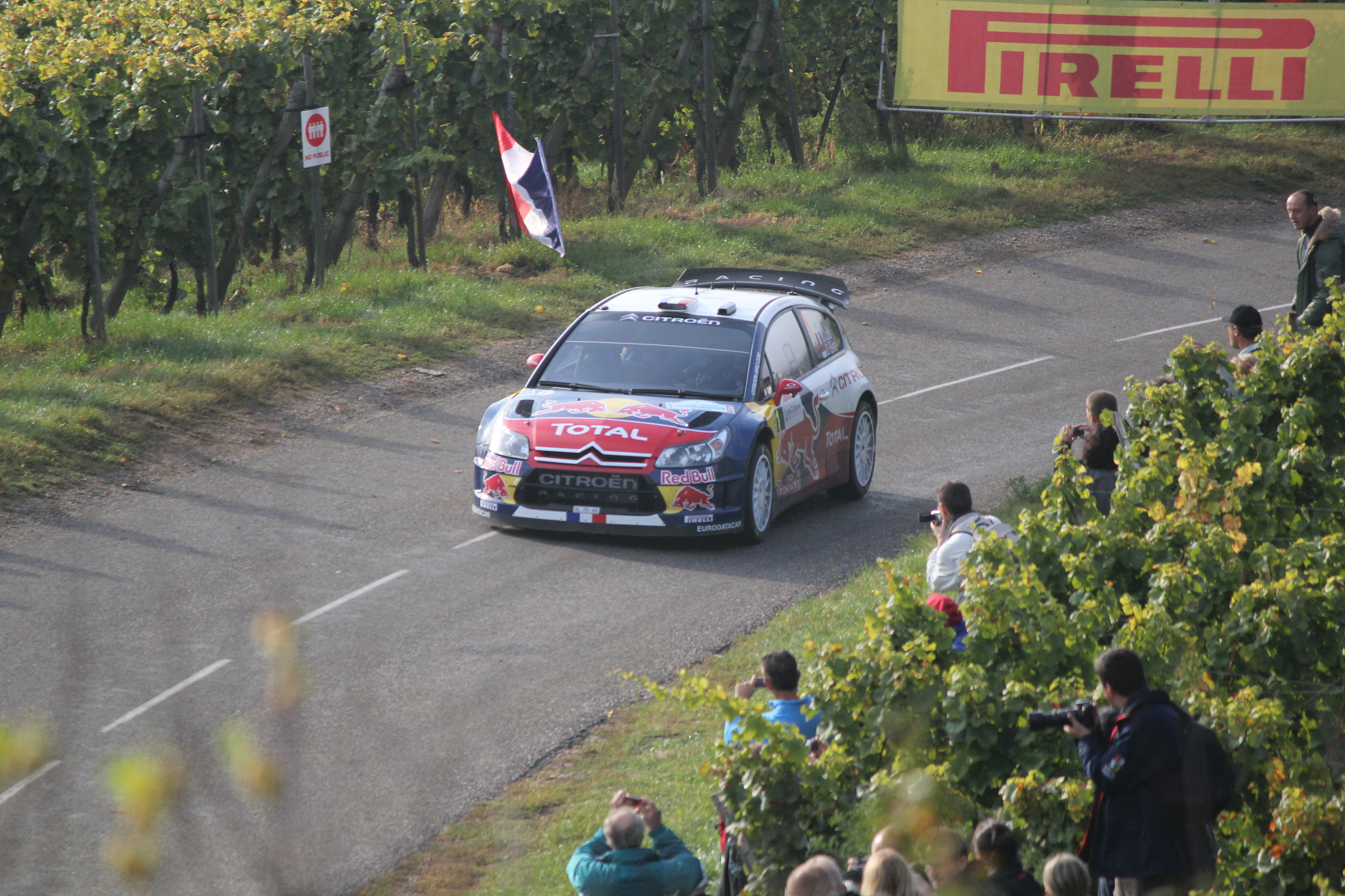 Sébastien Loeb & Daniel Elena, au premier jour du rallye de France Alsace lors des Championnat du monde des rallyes 2010.